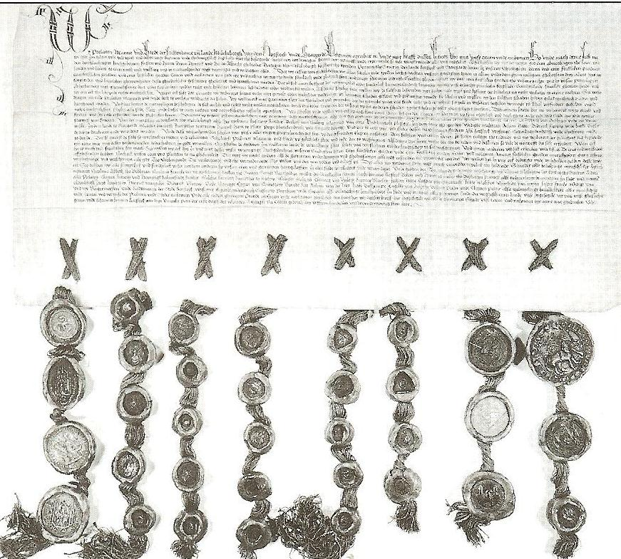 Grosse Union der mecklenburgischen Landstände vom 1. August 1523, Urkunde auf Pergament 37,7 x 74,3 cm, mit 34 abhängenende Siegeln, Landeshauptarchiv Schwerin (Landst:andisches Archiv 1a)